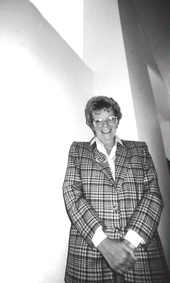 Luciana Giussani, con la sorella Angela creatrice del fumetto Diabolik, un un ritratto fotografico di Joe Zattere (Fumetti d'Italia)